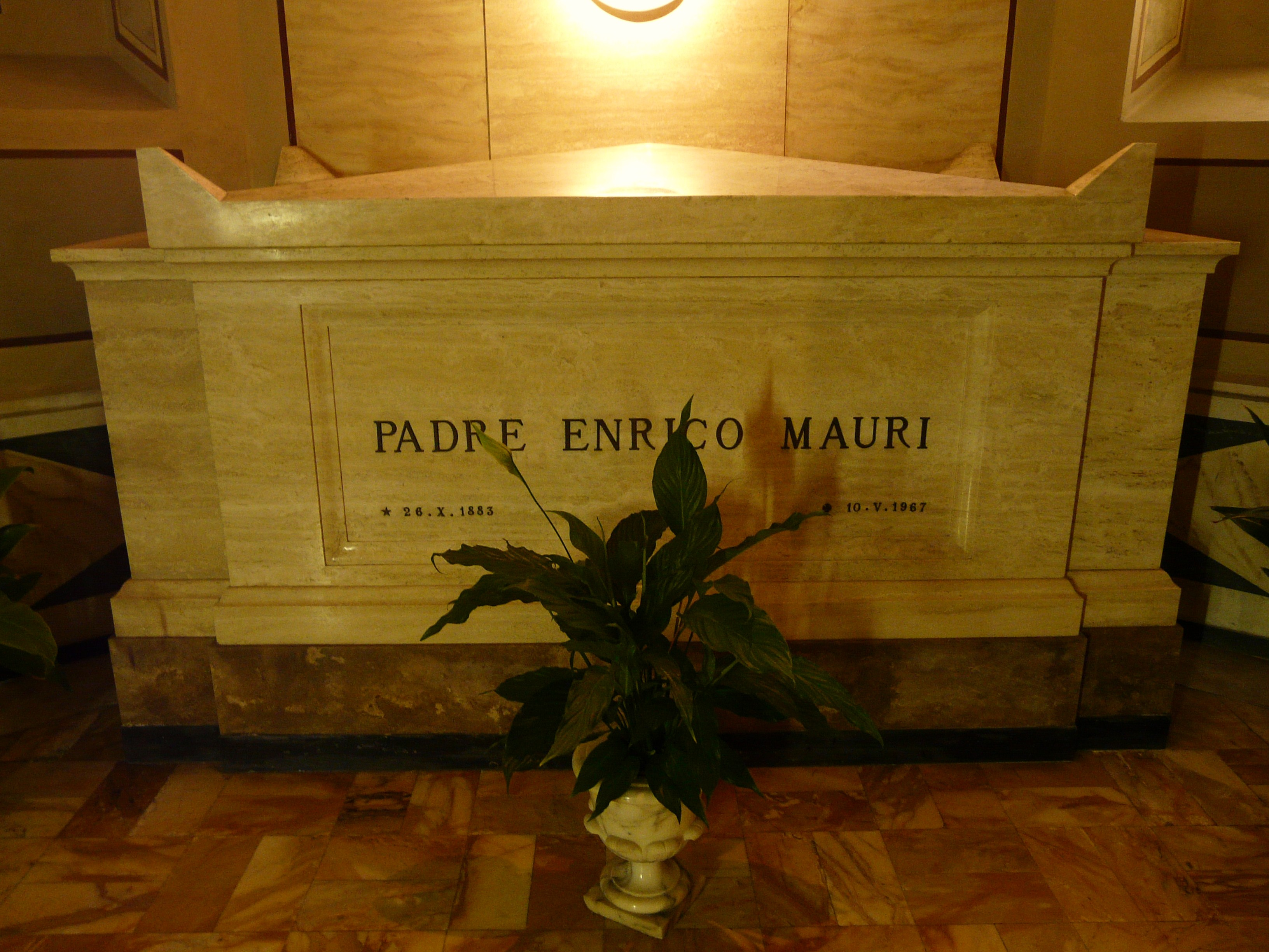 Tomba di padre Enrico Mauri nei sotterranei presso il santuario-tempio di Cristo Re, Sestri Levante, Liguria, Italia